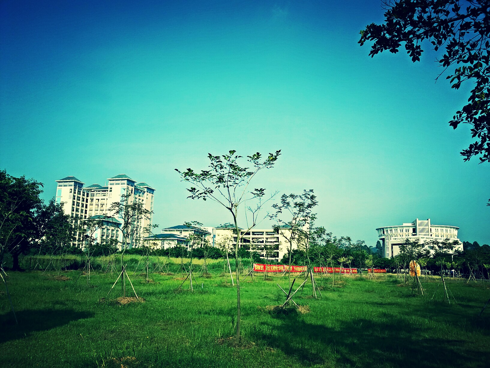 中文（中国大陆）: 校园一角1。